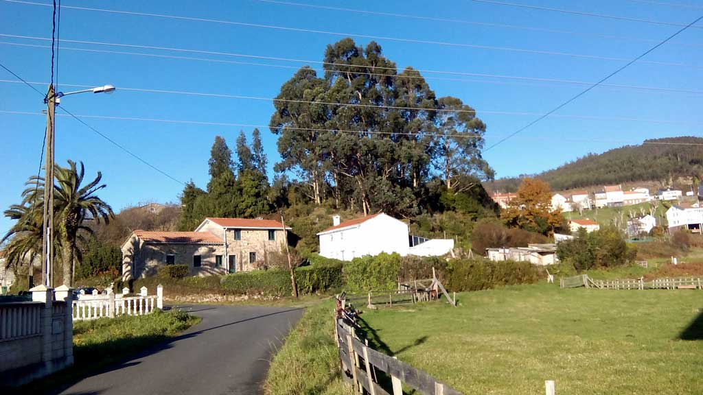 Vista dos Castros, Neda.